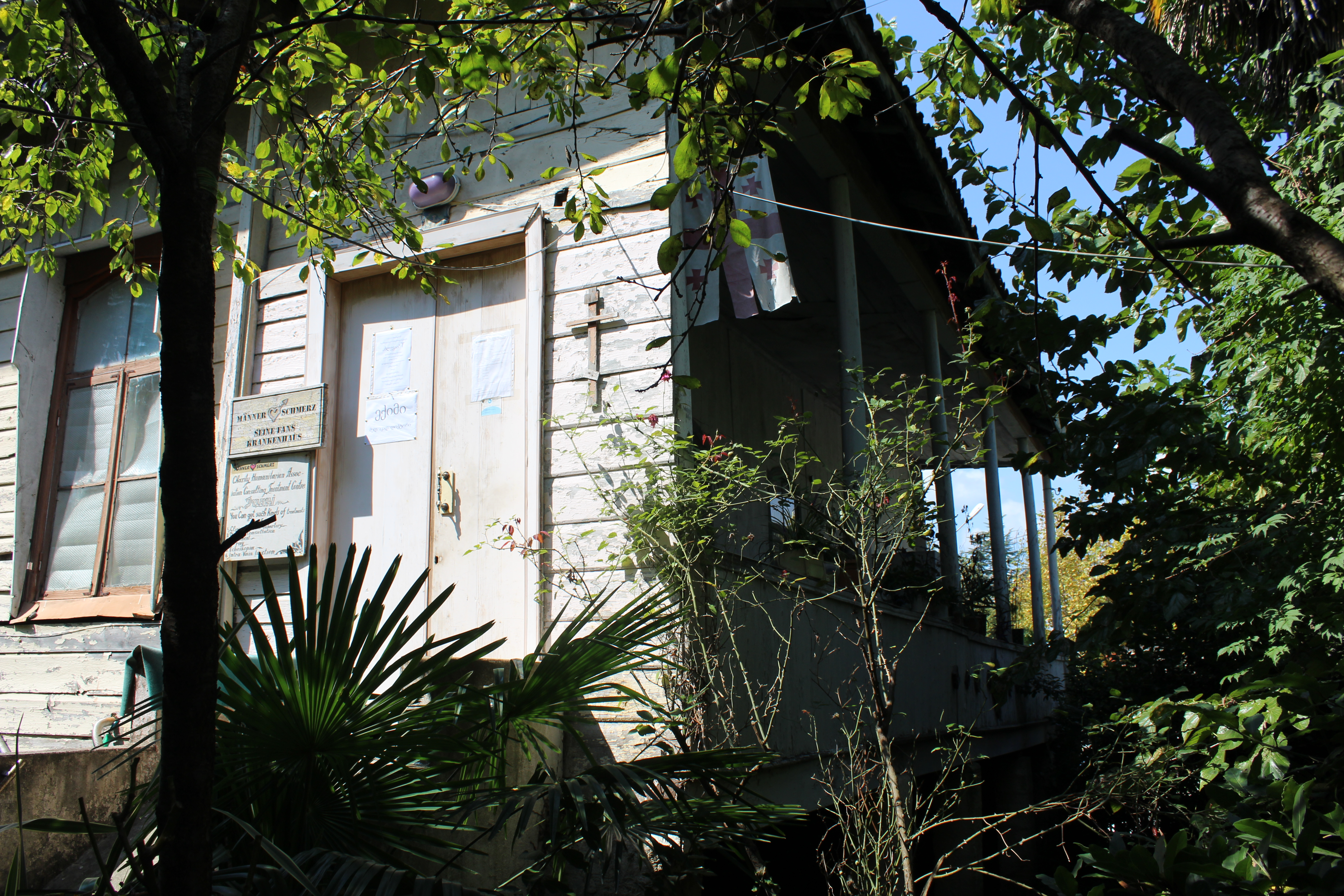 დიმიტრი გურიელის სასახლის დამხმარე ნაგებობა